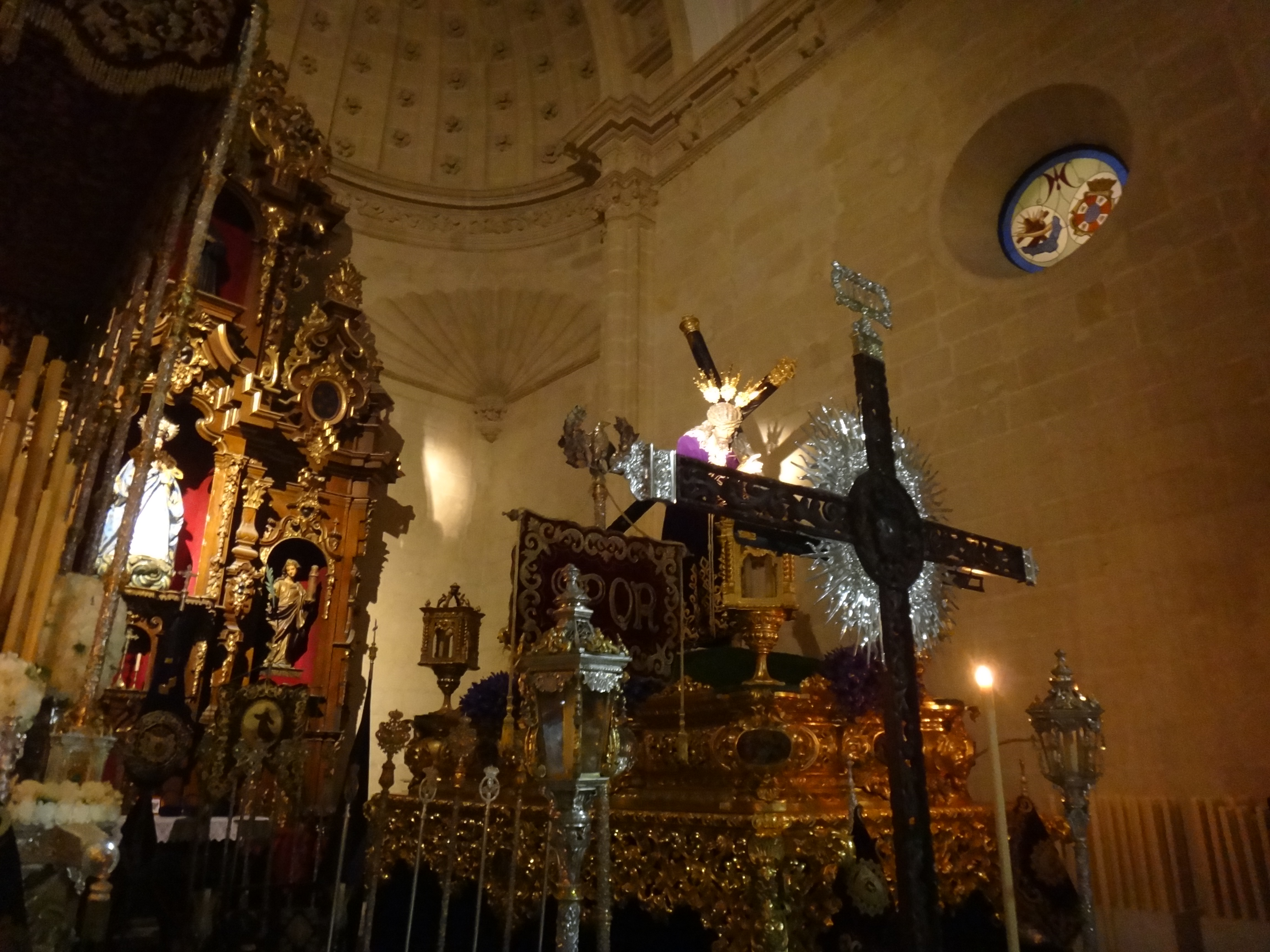 Cinco Llagas. Semana Santa de Jerez de la Frontera 2015 (Andalucía, España)